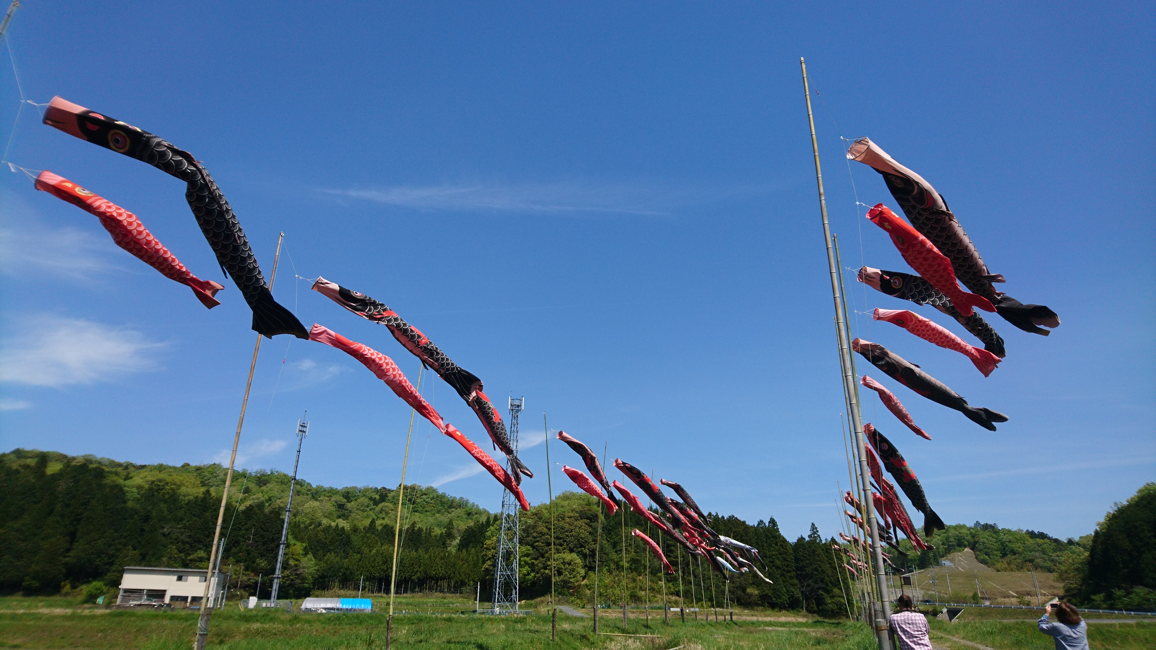 京丹後大宮インターチェンジ付近のこいのぼり